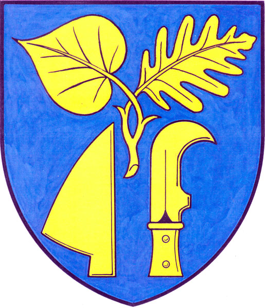 Znak obce Moravany (okres Brno-venkov)